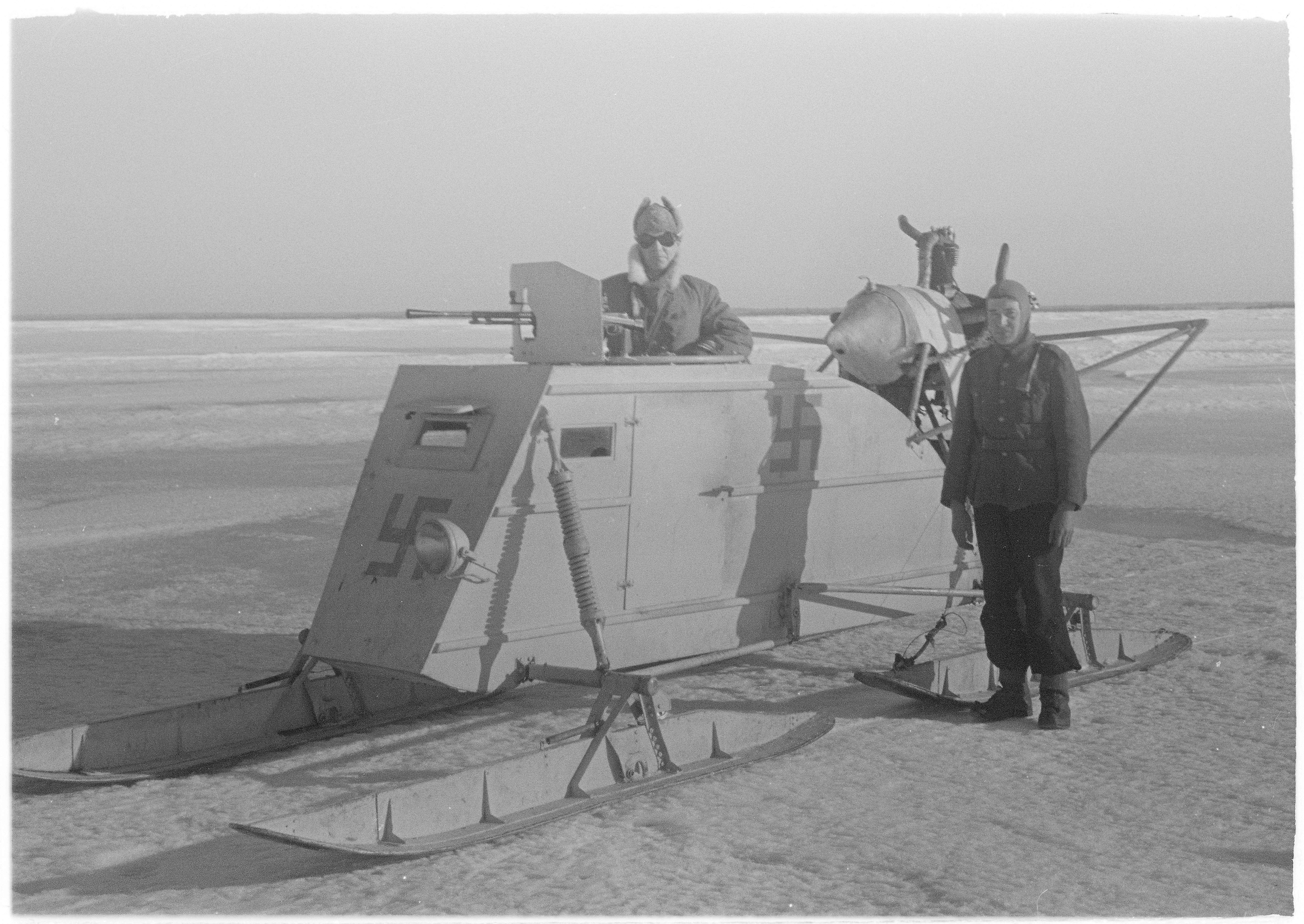 Vahv. RTR:n komentaja everstiluutnantti Kesämaa lähtee moottorikelkalla tarkastusmatkalle ulkosaarien tukikohtiin. Limosaari